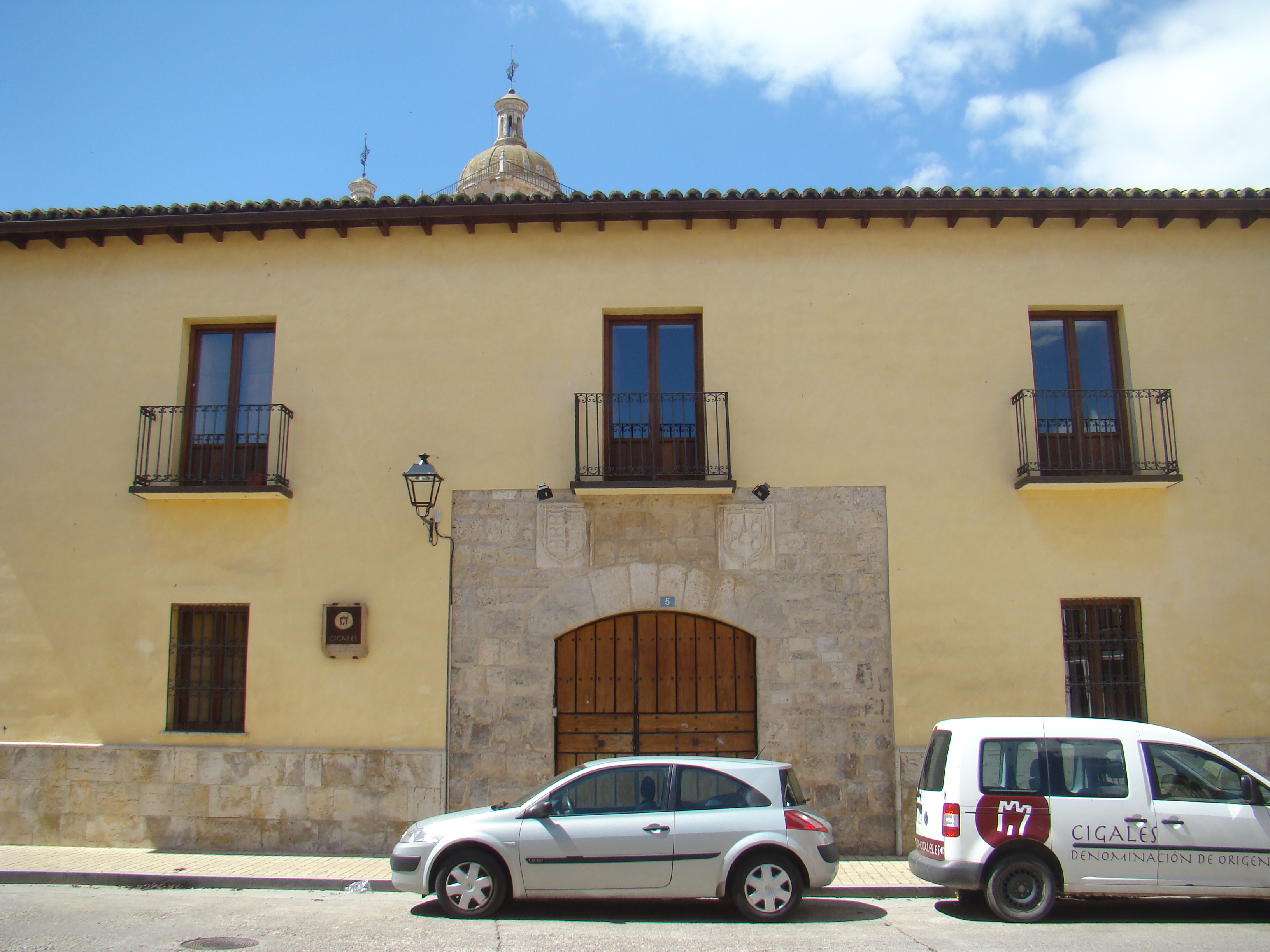 Casa Calderón Castro. Situada en la Calle Corro Vaca nº 5 de Cigales, Valladolid. Es la antigua casa de D. Francisco Calderón, mayordomo de los Duques de Frías. Construida entre finales del siglo XV y principios del XVI sobre zócalo de piedra. Tiene dos pisos. La portada es de piedra caliza y tiene un arco escarzado con grandes dovelas. A derecha e izquierda están labrados los escudos de los Calderón y los Castros. La casa sirve de sede para el Consejo Regulador de la Denominación de Origen de Cigales.